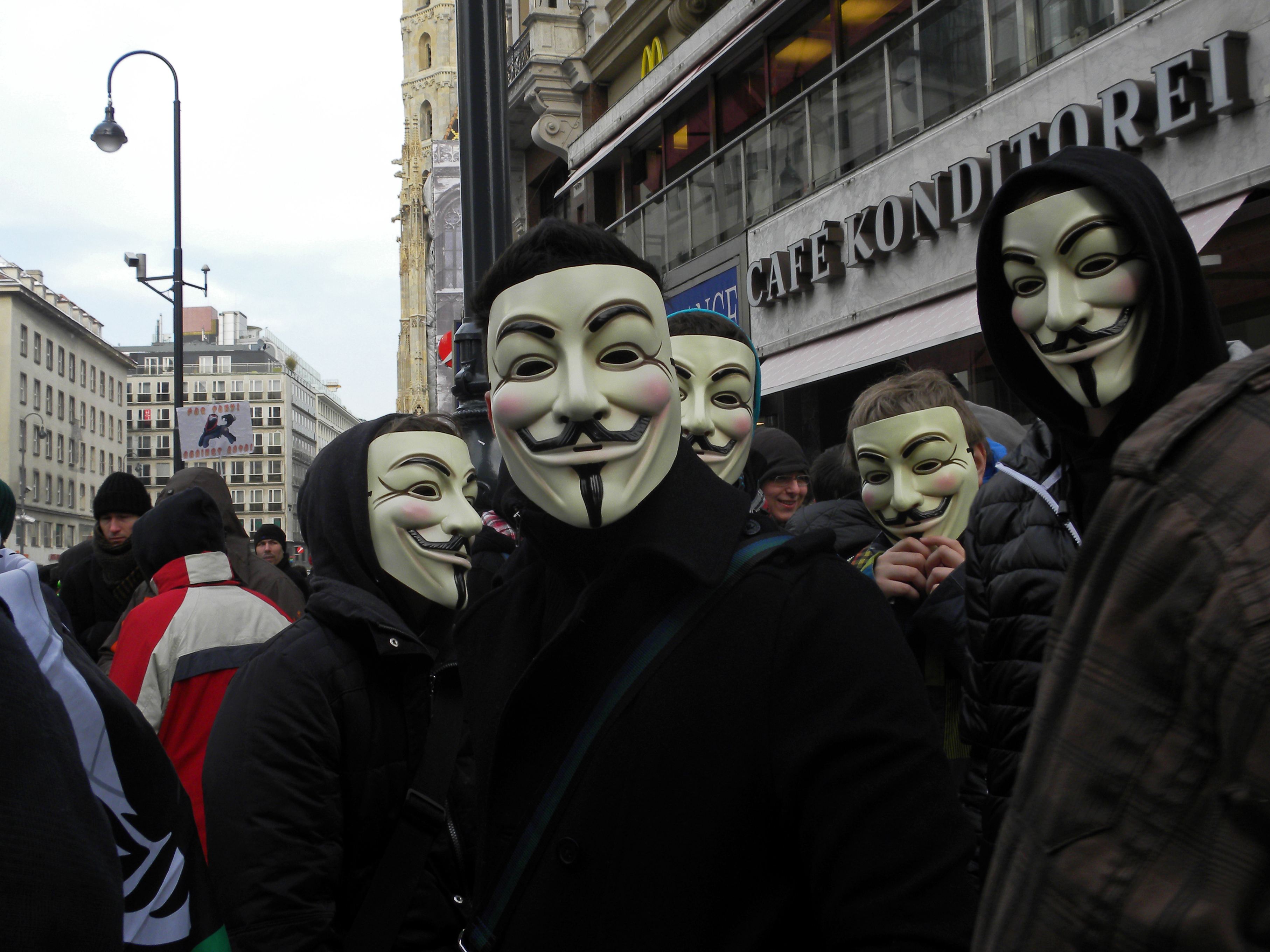 Stop-ACTA-Demonstration in Wien am 11. Februar 2012